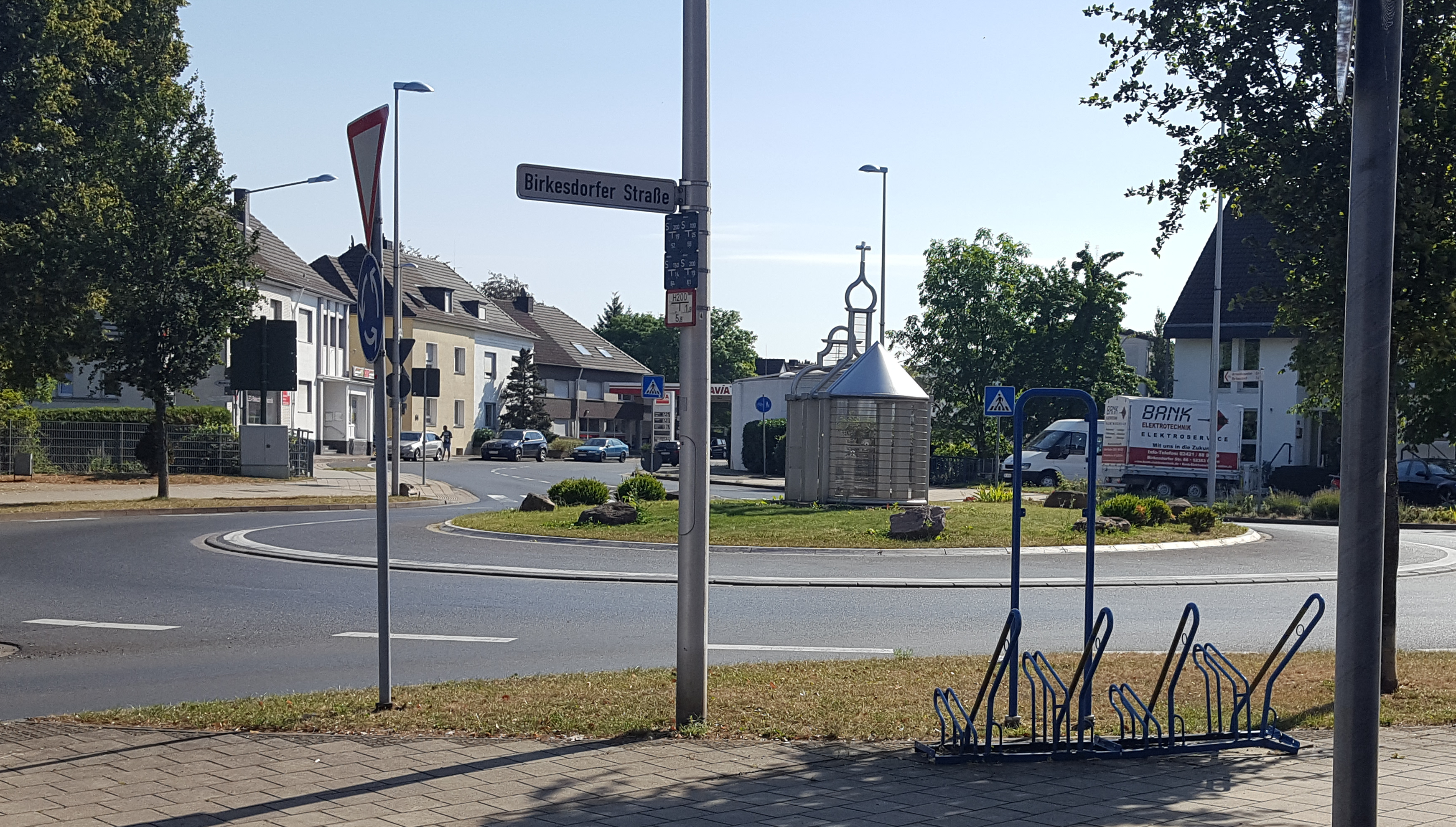 Die Hovener Mitte, im September 2016, mit Blick in Richtung Birkesdorf.